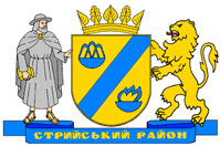 Герб Стрийського району Львівської області України